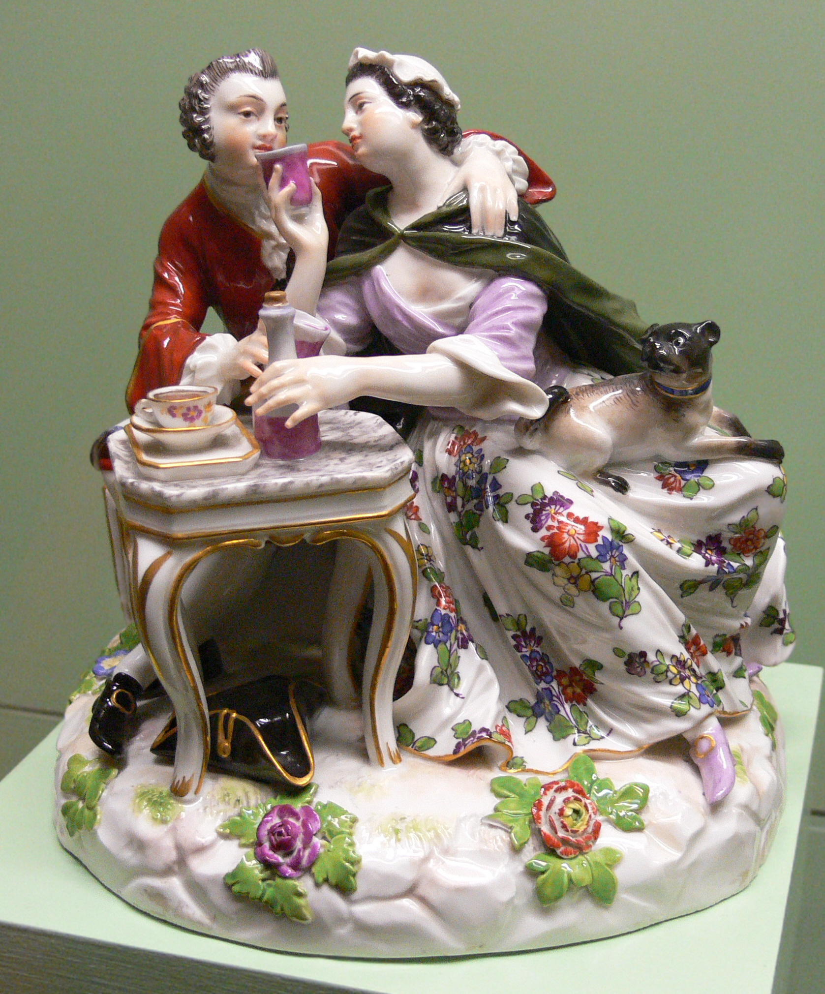 Johann Joachim Kaendler: Liebespaar am Früchstückstisch im freimaurerischen Ambiente, Meissener Porzellan 1744, Ausformung um 1900 Café und Museum "Zum arabischen Coffe Baum", Leipzig